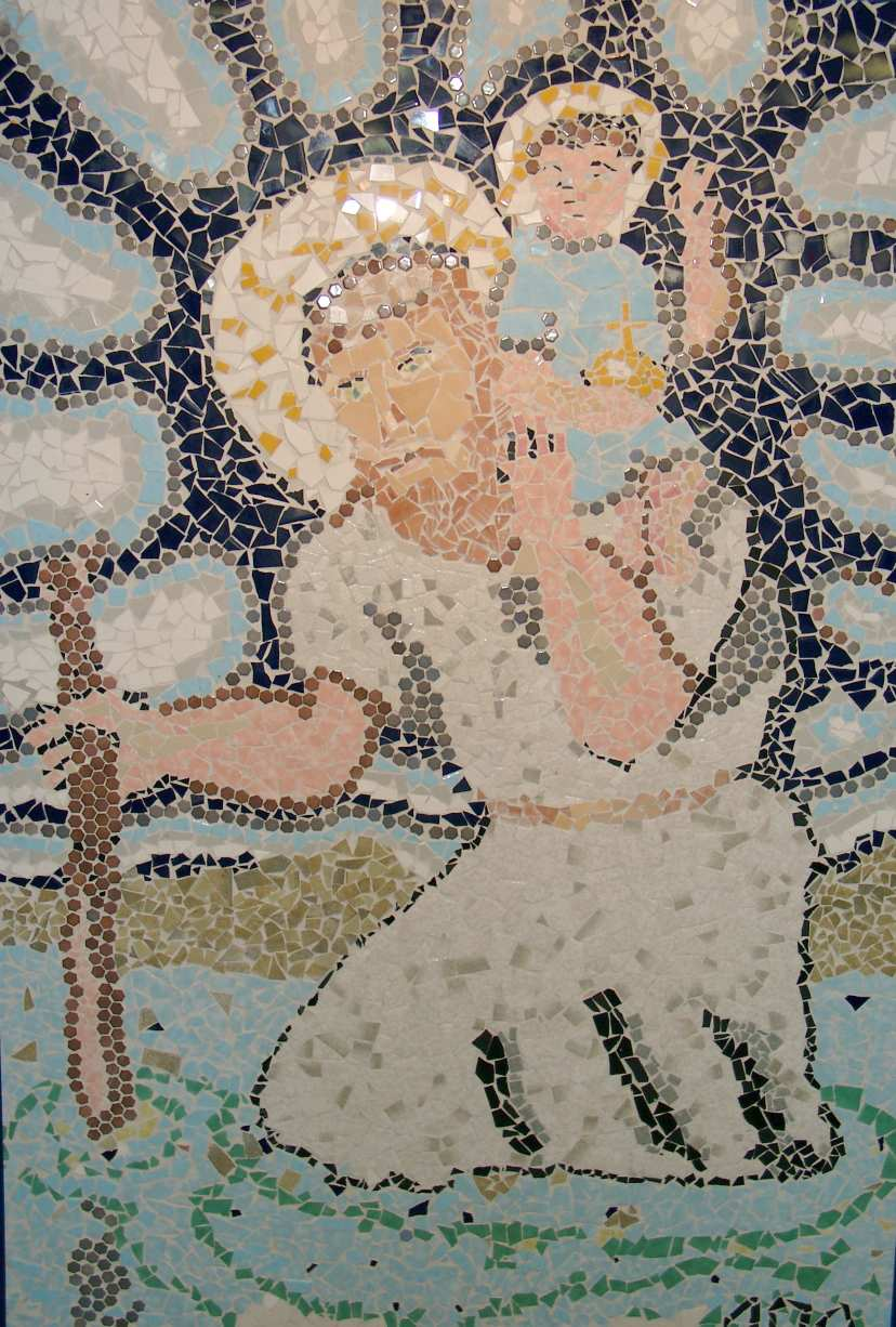 Christophorusabbildung im CJD Königswinter, A-Gebäude